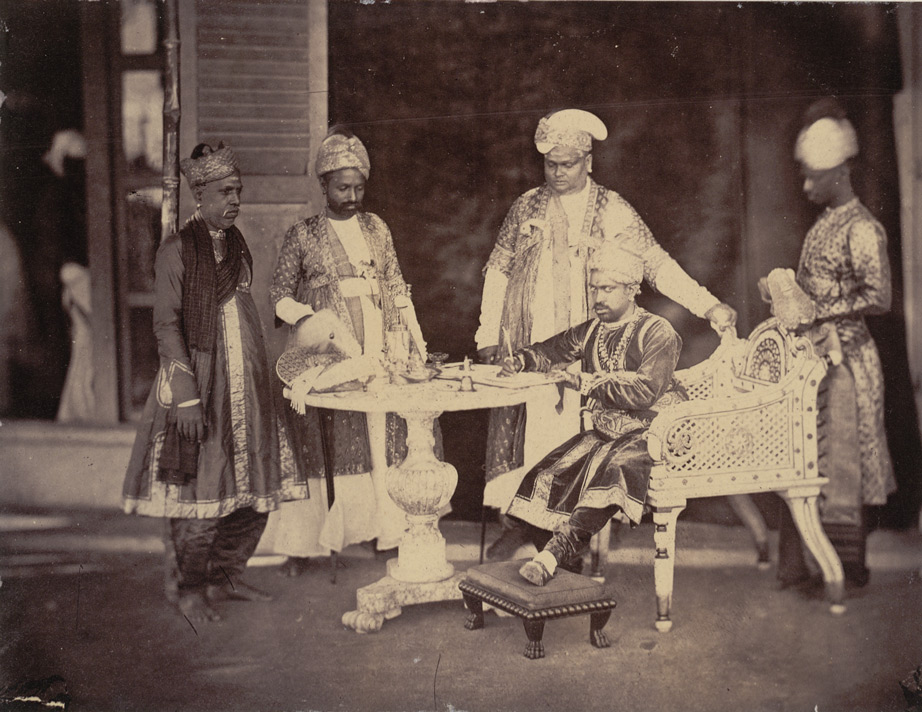 Photograph of the H.E. Tondaiman Rajah and his ministers, part of the 'Photographic Views of Poodoocottah' (Madras, 1858) collection, taken by Linnaeus Tripe in 1858. In 1855, Tripe was commissioned to take photographs for the British East India Company and the Madras Presidency which resulted in six albums, one of which concentrated on Pudukottai and is seen here. Now in the modern state of Tamil Nadu, Pudukottai was once a princely state under the Tondaiman Rajas. This view shows a portrait group in the durbar hall of the palace, with Ramchandra Tondiman-the Raja of Pudukkottai-seated in the middle, flanked by two rows of seated ministers.